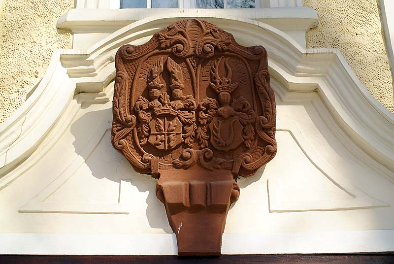 Bagno, pałac, ob. klasztor salwatorianów, pocz. XVIII, XX